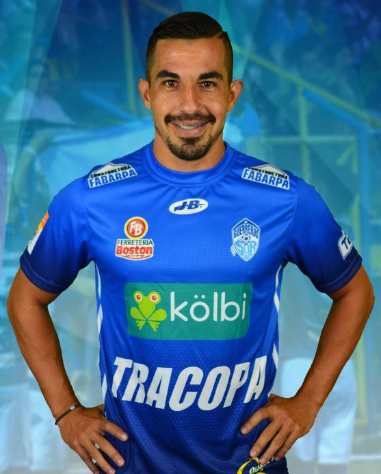 Álvaro Sánchez en su presentación oficial con el Pérez Zeledón en 2017.